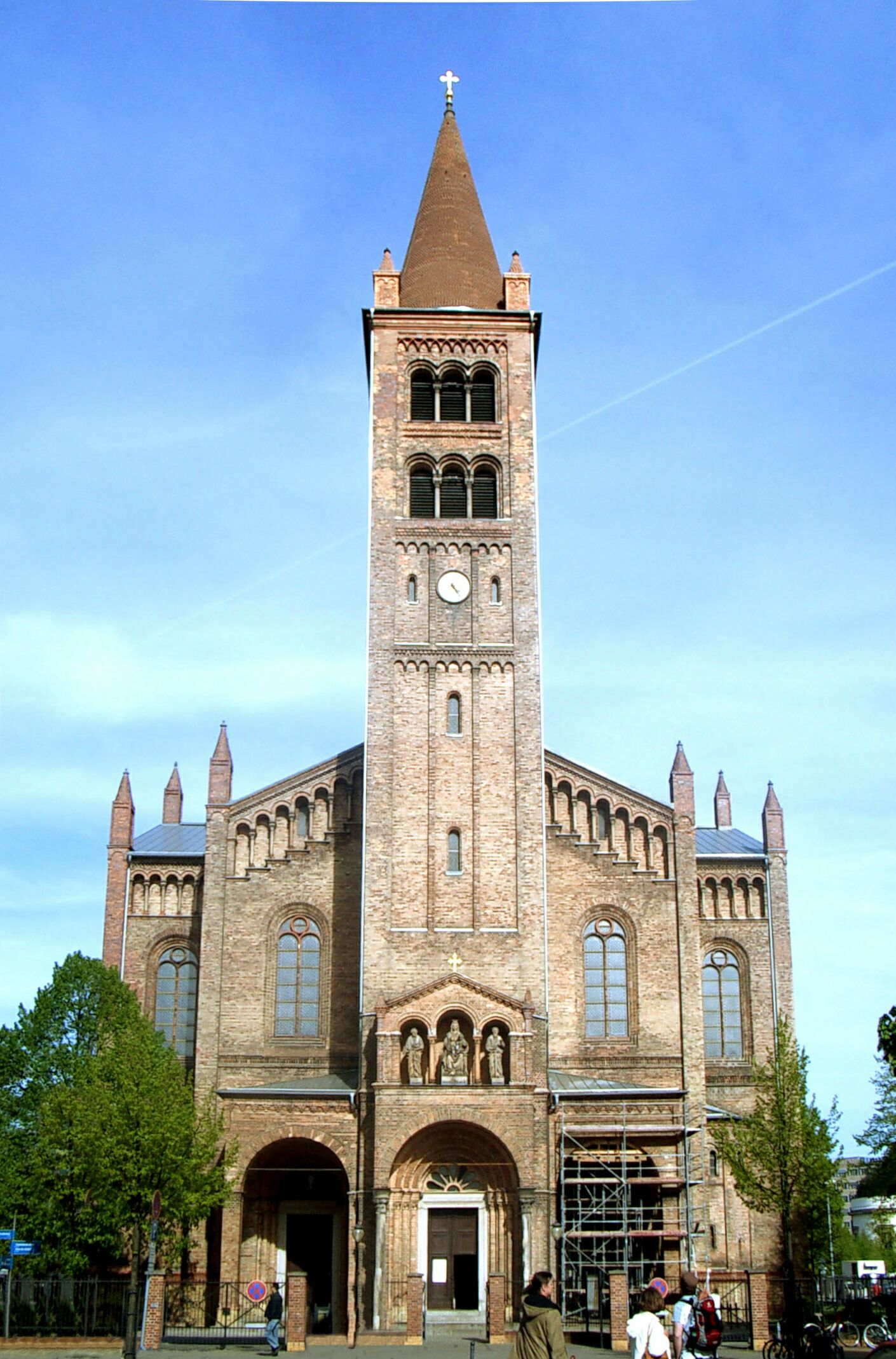 Die St. Peter und Paul Kirche in Potsdam am Bassinplatz. (St. Peter and Paul church in Potsdam, Germany)